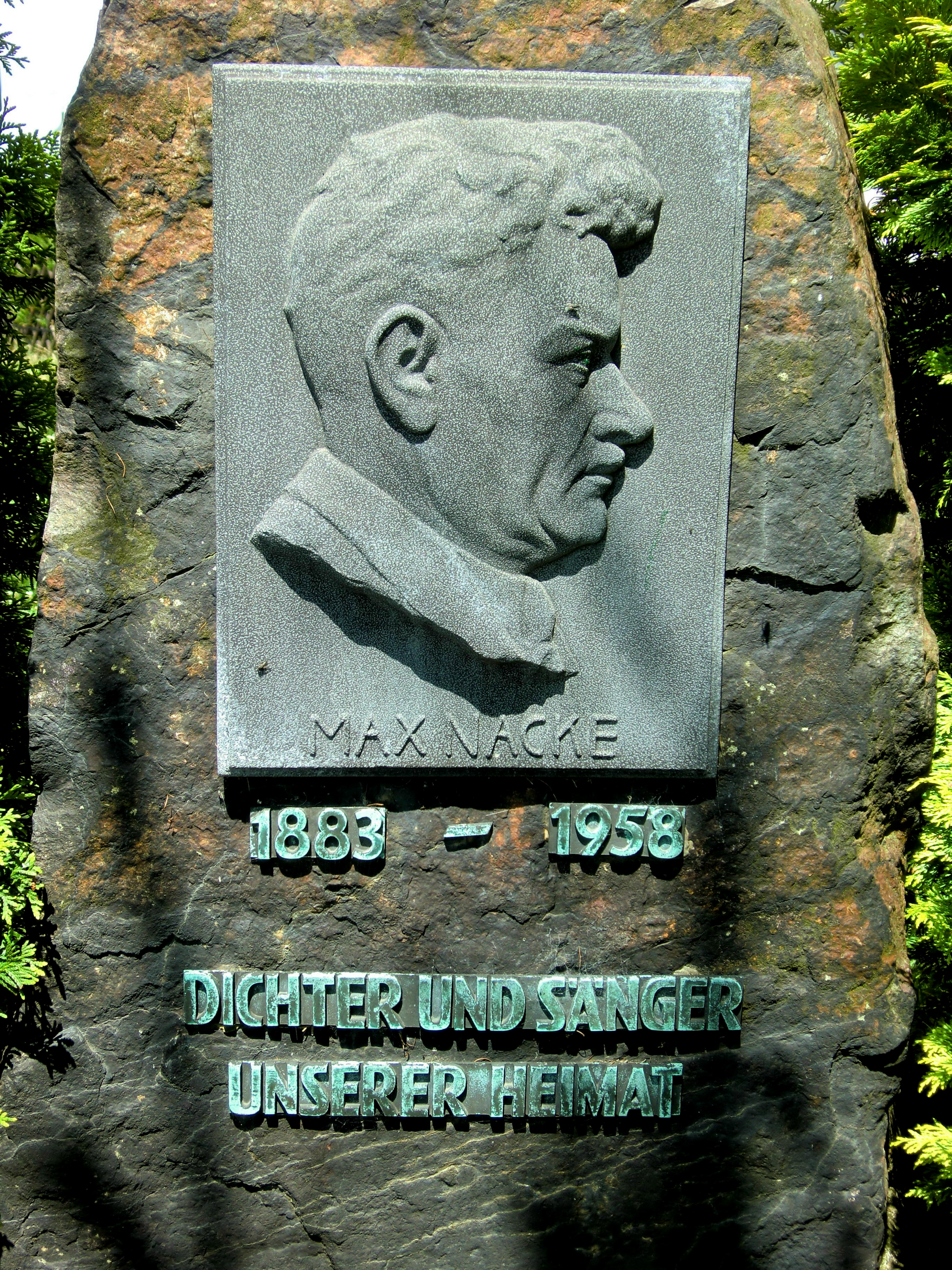 Altenberg, Denkmal Max Nacke, Detail, Parkanlage Hirschsprunger Str./ Abzw.Neustadtstr